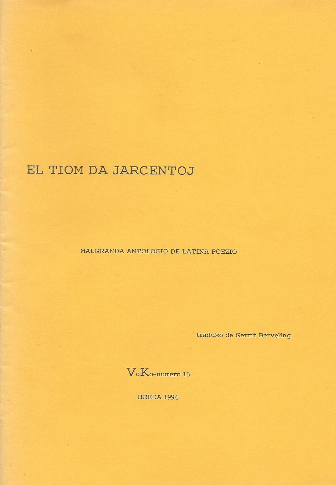 librokovrilo de "El Tiom da Jarcentoj", 1994